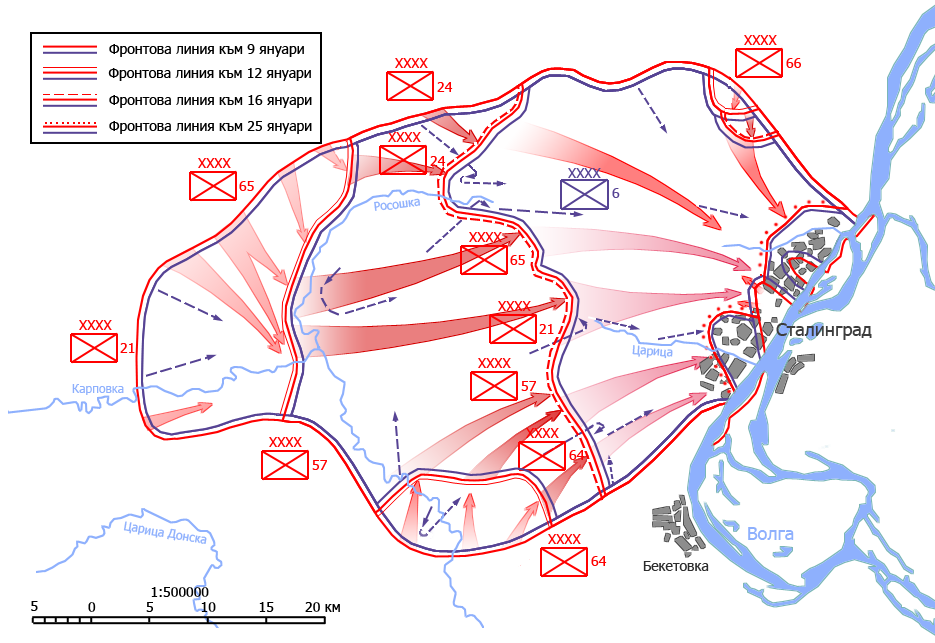 Карта на бойните действия по време на операция Пръстен. Битка за Сталинград.